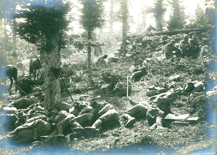 Снимка на австро-унгарски войници по време на почивка в Монте Марониа, Италия.